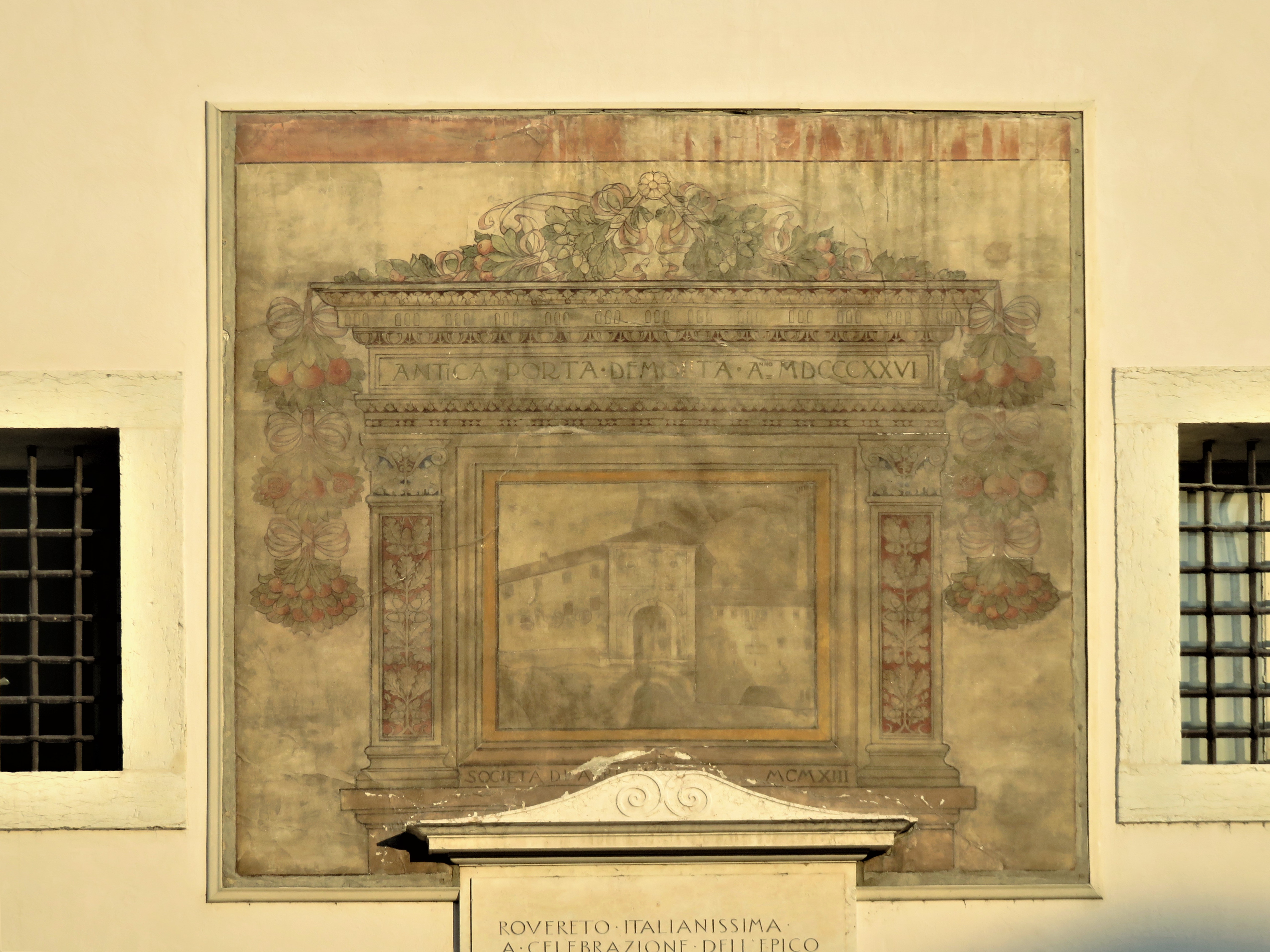 affresco che raffigura porta San Tommaso (demolita nel 1822) fatto dipingere nel 1911 dalla Società di abbellimento di Rovereto